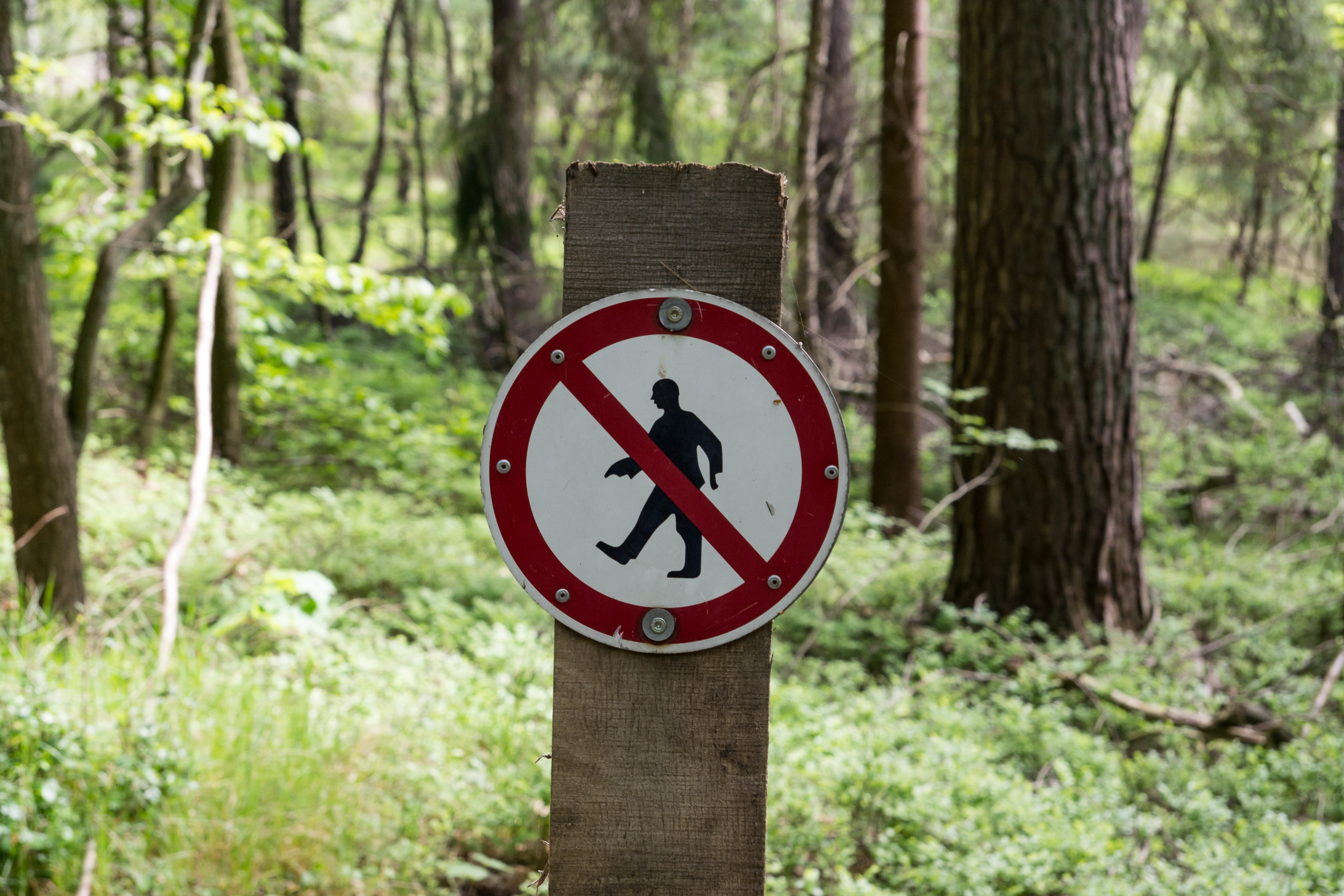 Naturschutzgebiet LIP-015 Donoperteich-Hiddeser Bent, seltsames "betreten verboten"-Schild am Hiddeser Bent